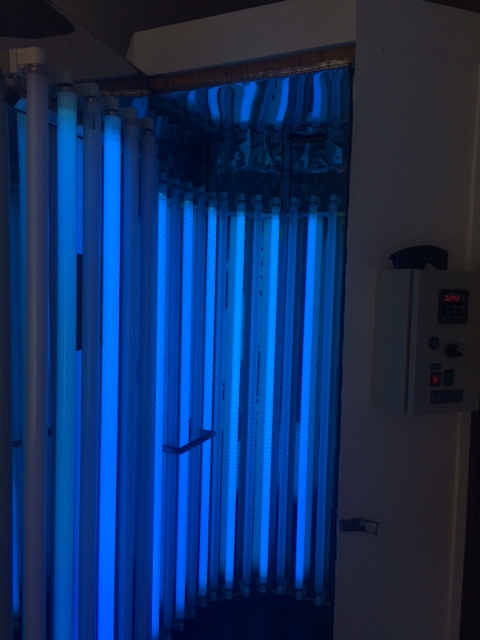 Cabine contendo lâmpadas UVB